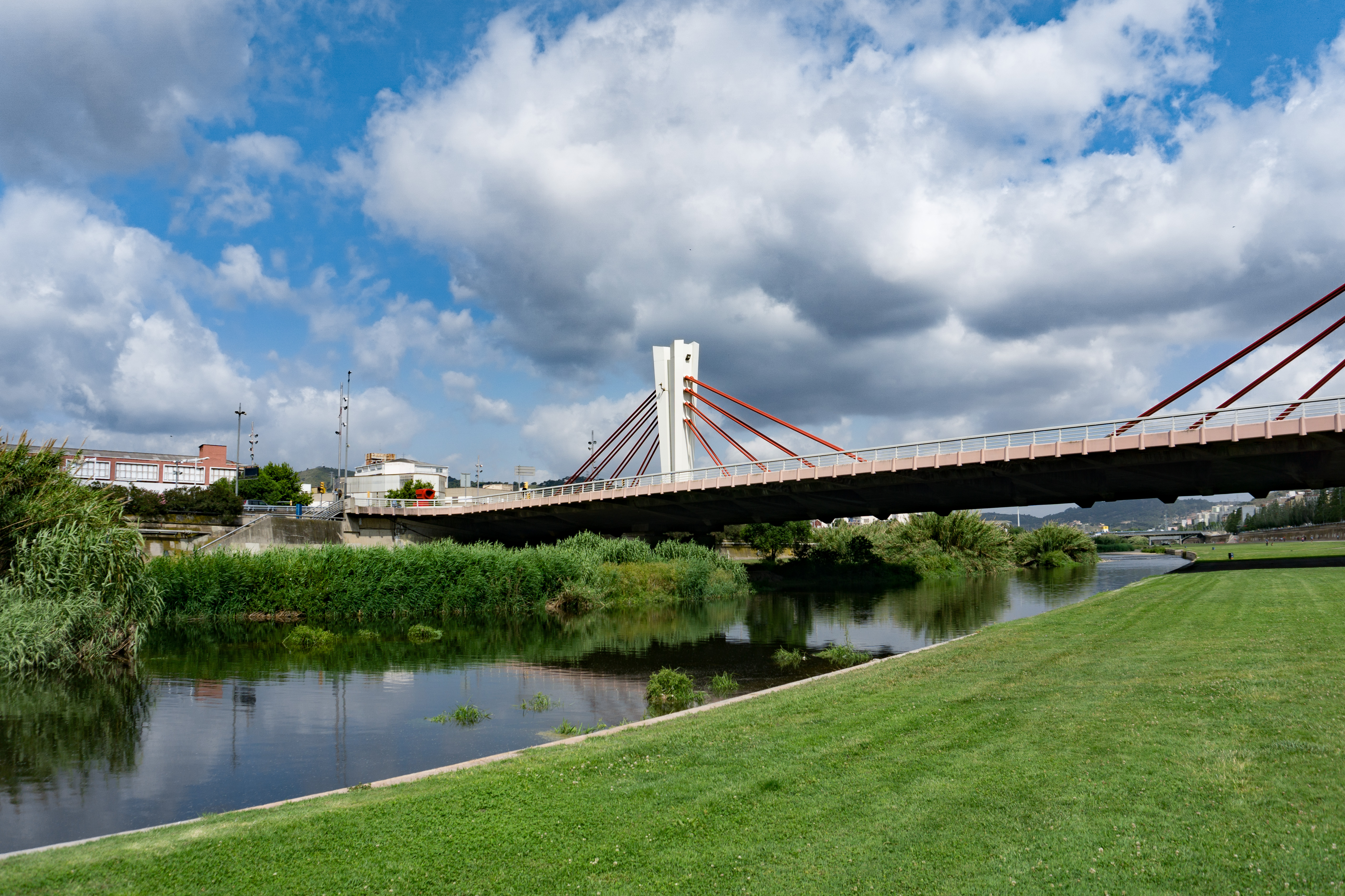 Parque fluvial del Besós y puente de Can Peixauet